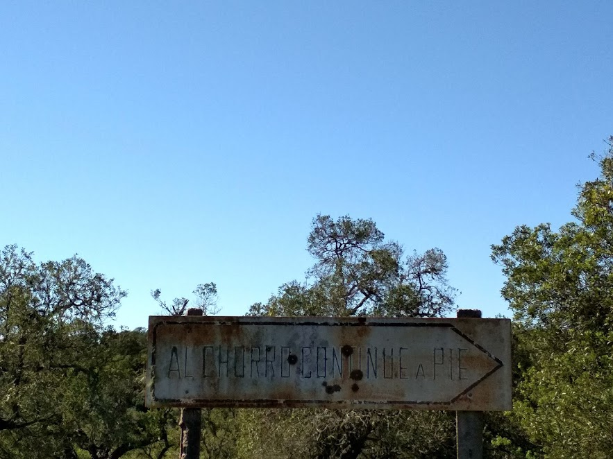 Cartel